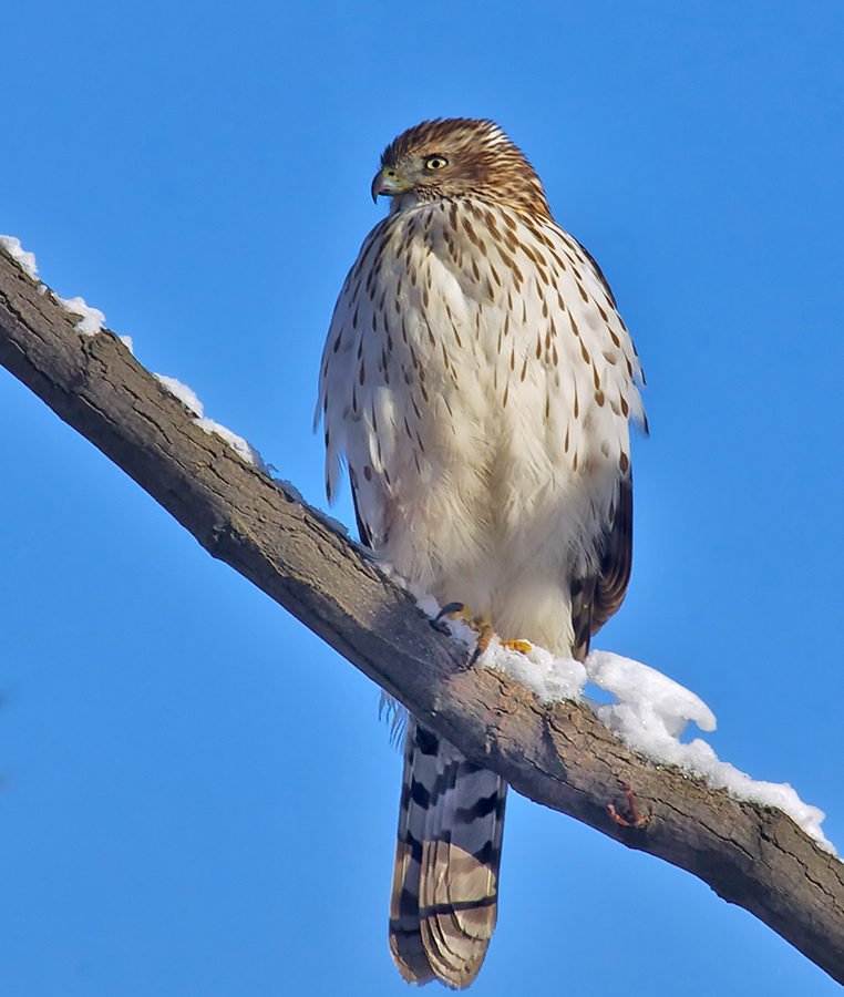 Accipiter cooperii dans un parc de la ville de Québec, 09 déc 2010.